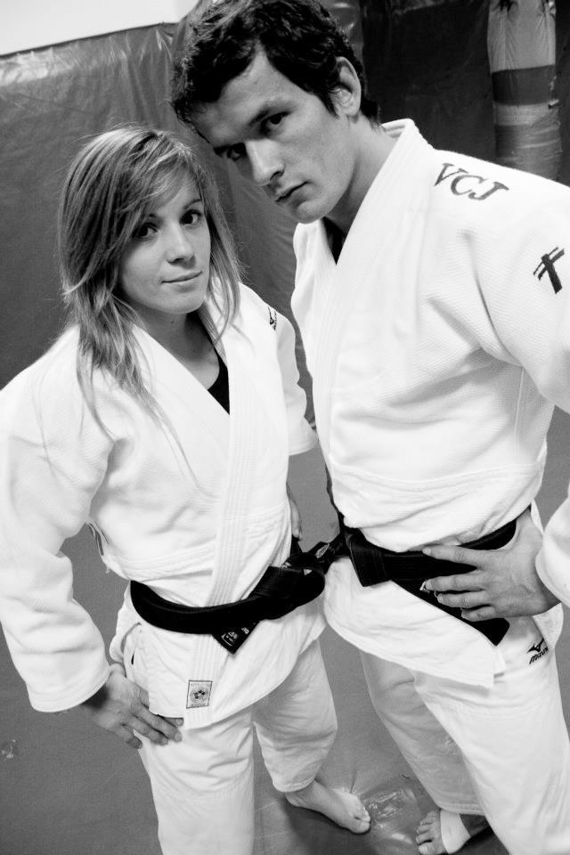 Laura Gómez Ropiñón & Sugoi Uriarte 2012